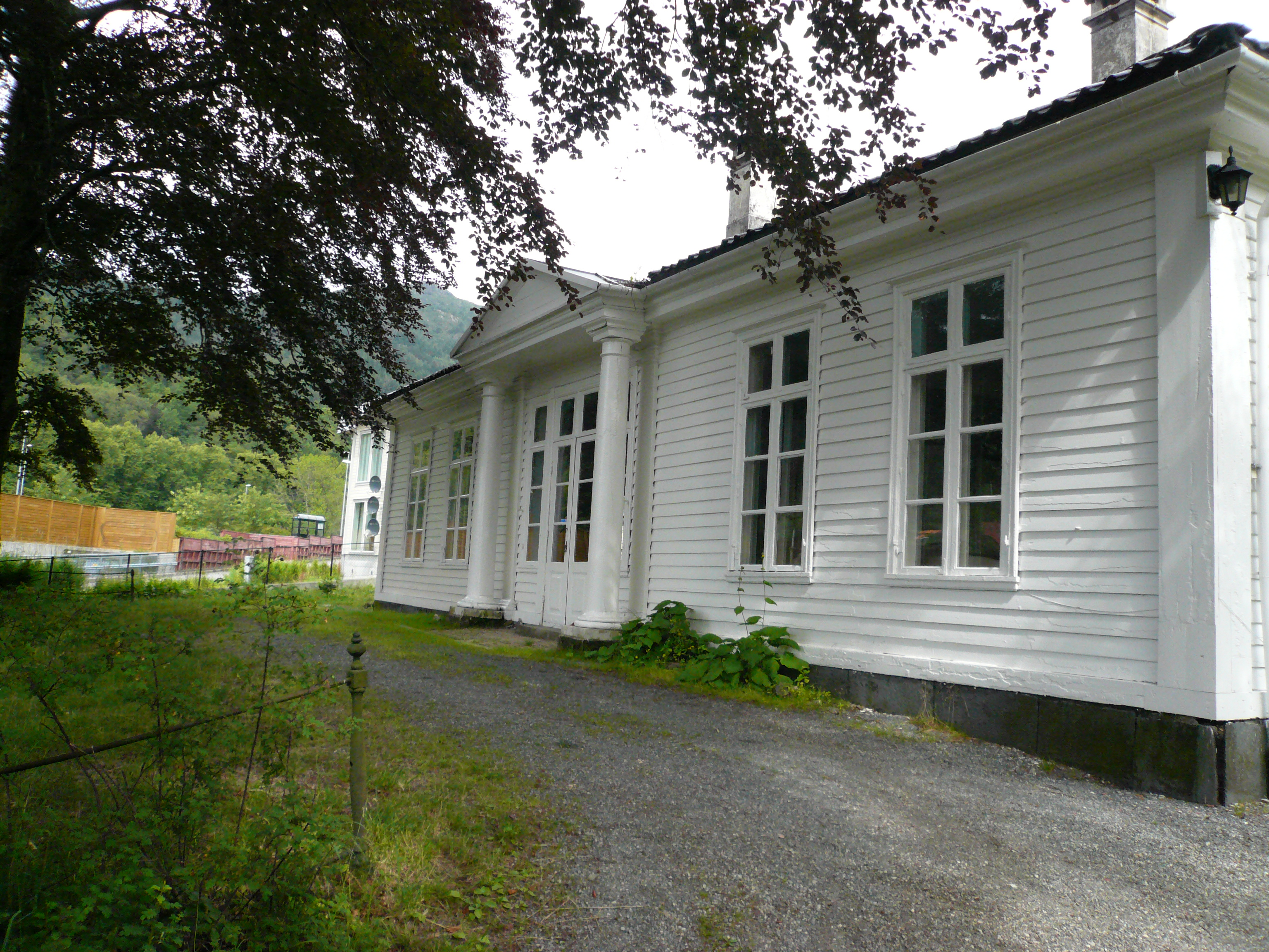 Hellandhuset